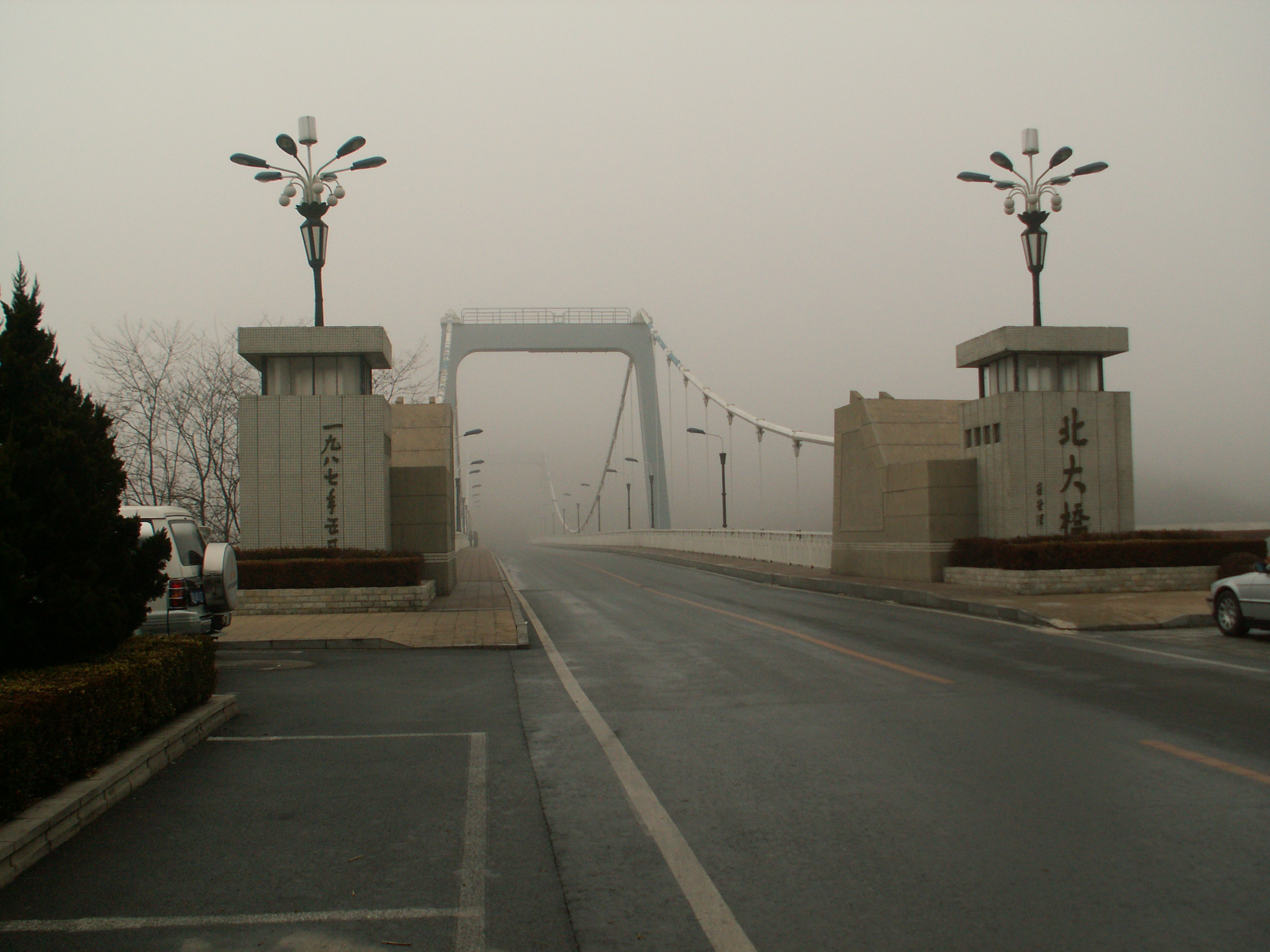 大連市北大橋